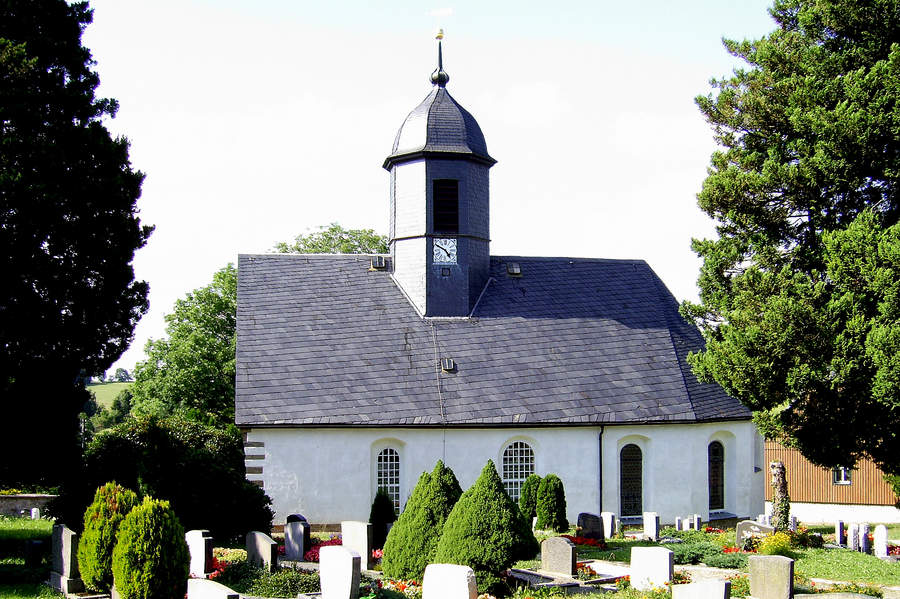 Kirche in Hennersdorf